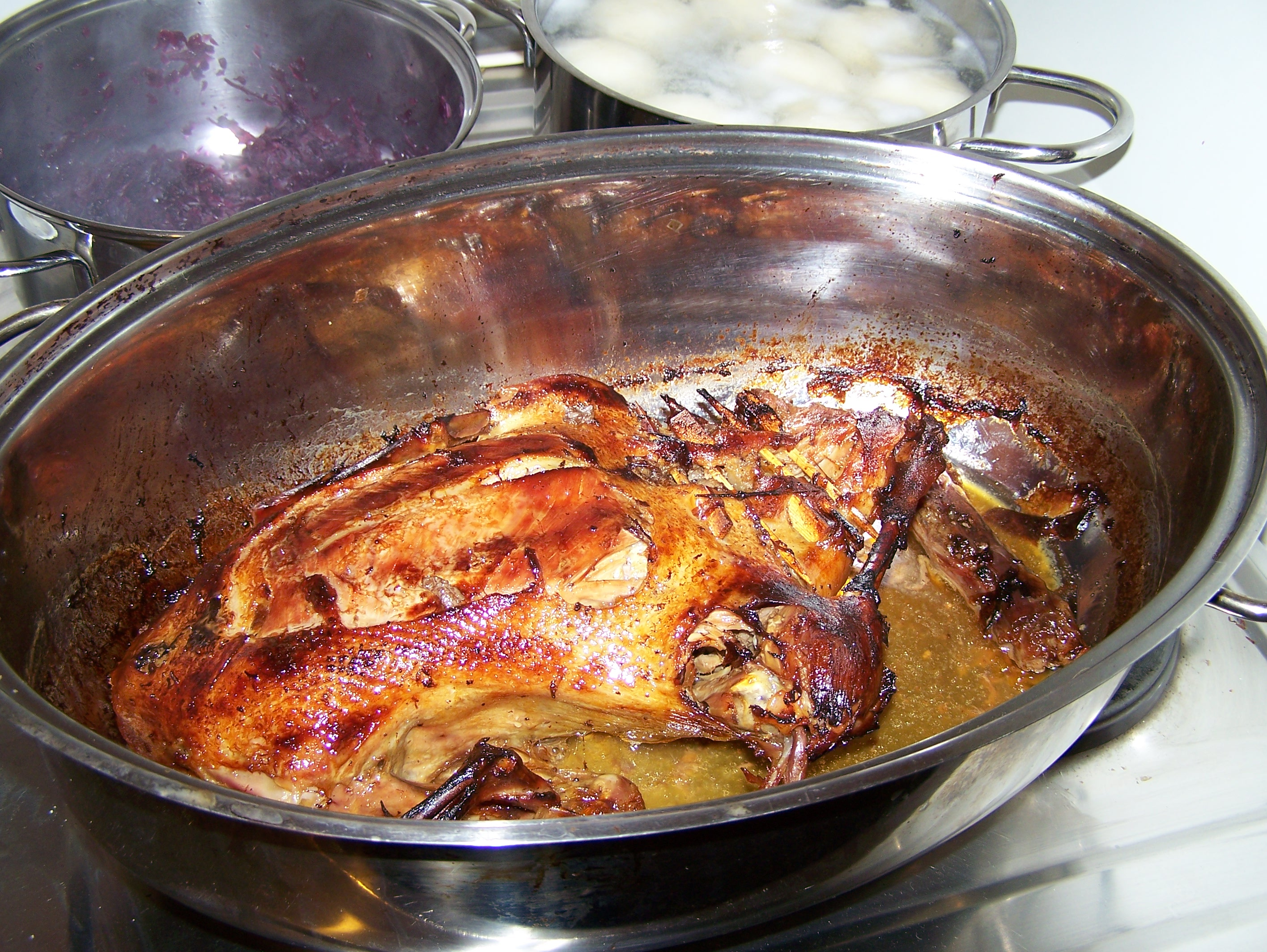 Dünsten einer Ente in der Pfanne mit wenig Flüssigkeit (hier mit abgenommenem Deckel am Ende des Garvorgangs).